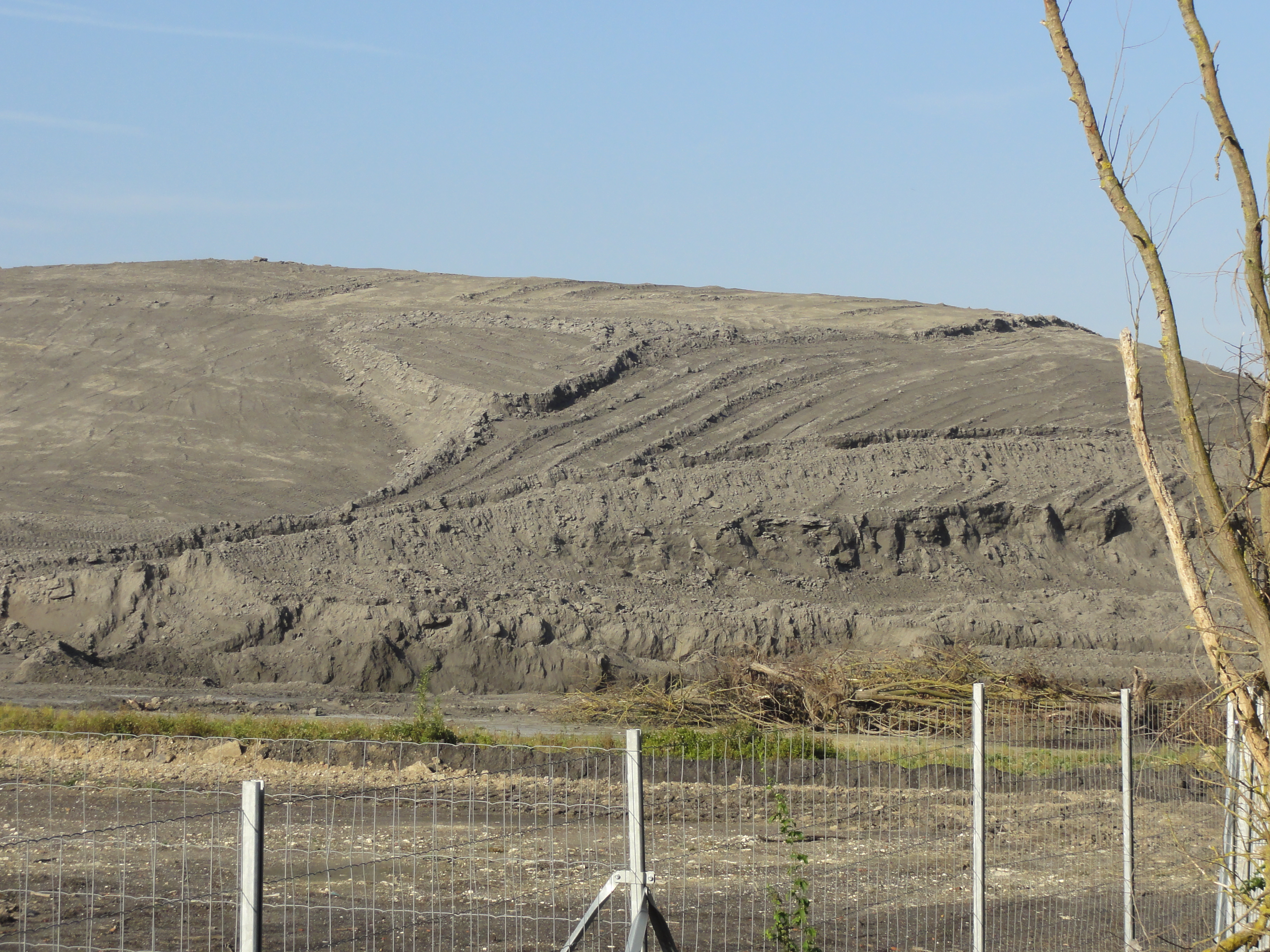 Terril n° 64 dit Cendres de Vermelles, Compagnie des mines de Béthune dans le bassin minier du Nord-Pas-de-Calais, Vermelles, Pas-de-Calais, Nord-Pas-de-Calais, France.